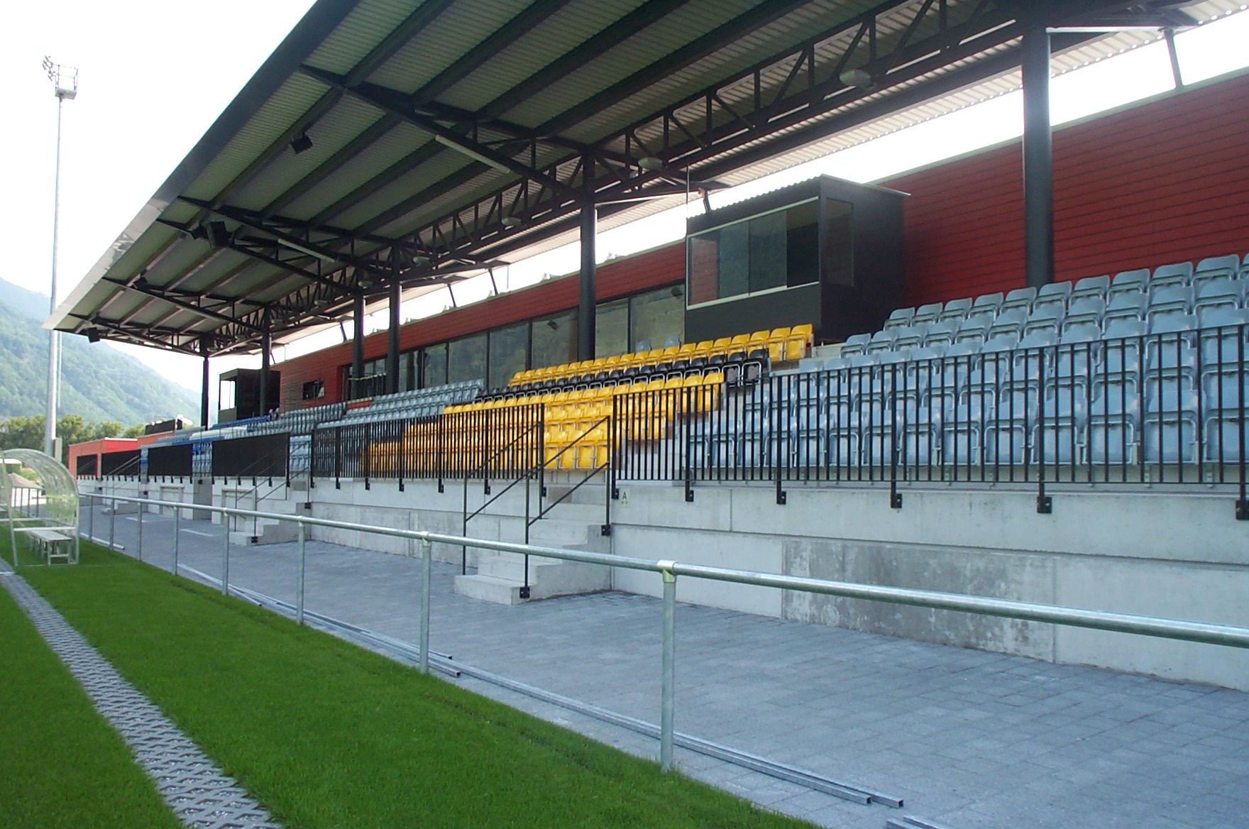 New grandstand of Sportpark Eschen-Mauren, stadium of USV Eschen-Mauren